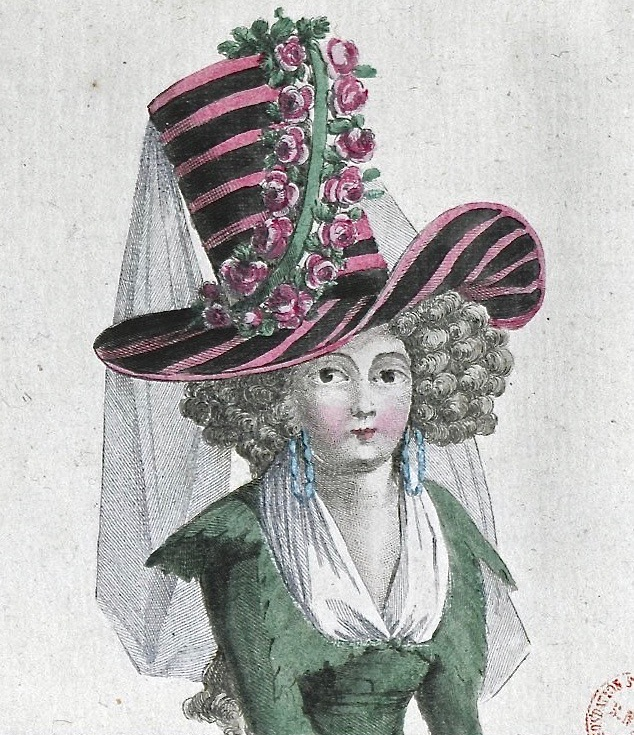 Duhamel nach Jean-Florent Defraine (* 1754): Damenhut à la "Tarare" (Oper von Pierre-Augustin Caron de Beaumarchais und Antonio Salieri). In: Magasin des modes nouvelles, françaises et anglaises (…), 2. Jahrg., Buisson, Paris 1787, Heft 34, 20. Oktober, Tafel 3 (Figur links). Bibliothèque nationale de France.